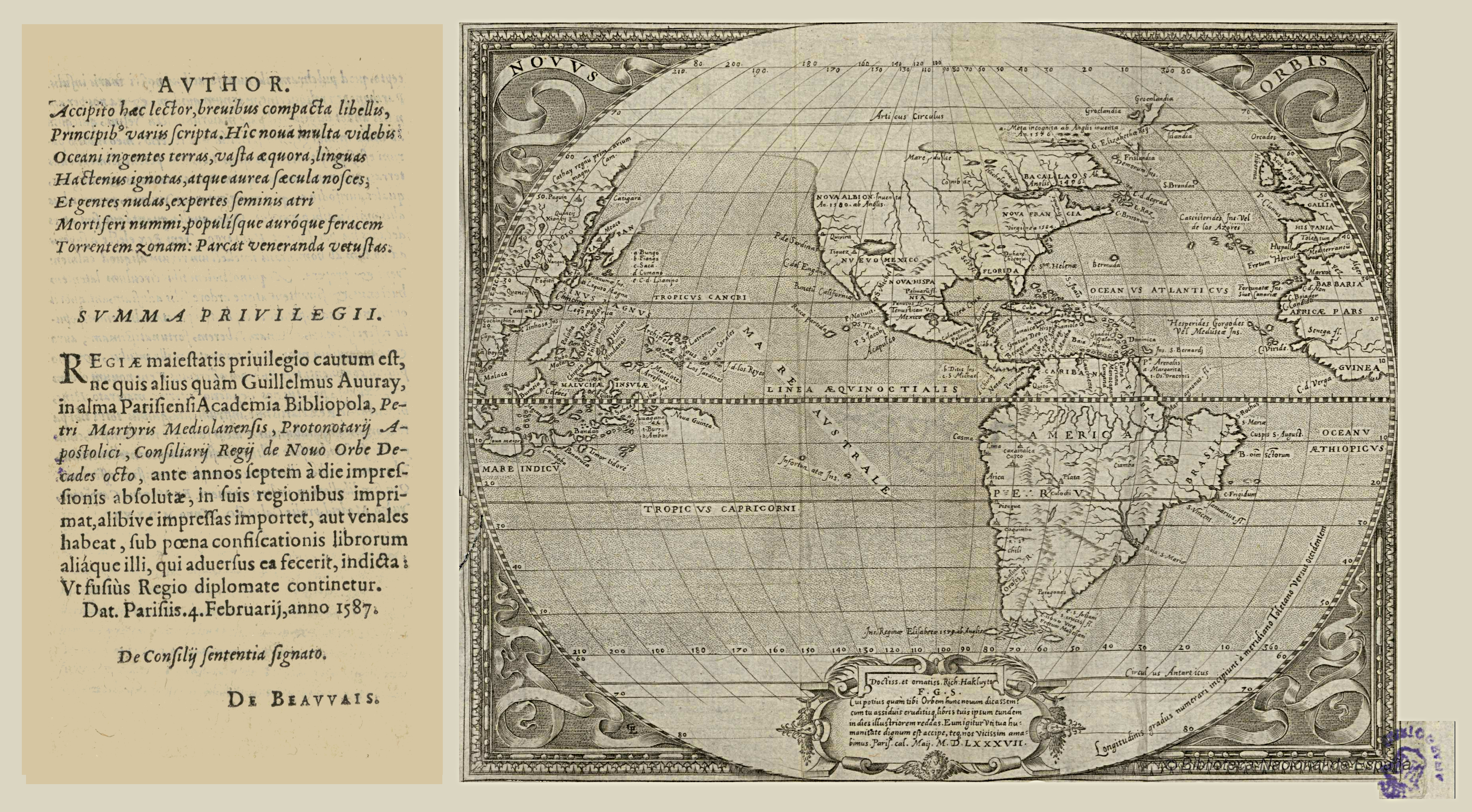 Cartographie des Amériques dans l'édition anglaise de l’œuvre De Orbe novo,... decades octo... annotationibus illustratae suoque nitori restitutae de Pietro Martire d' Anghiera (Petri Martyris Anglerii). Publié par Richardi Hakluyti, Guillaume Auvray.- . Illustrations; América, Mapas generales, 1587.